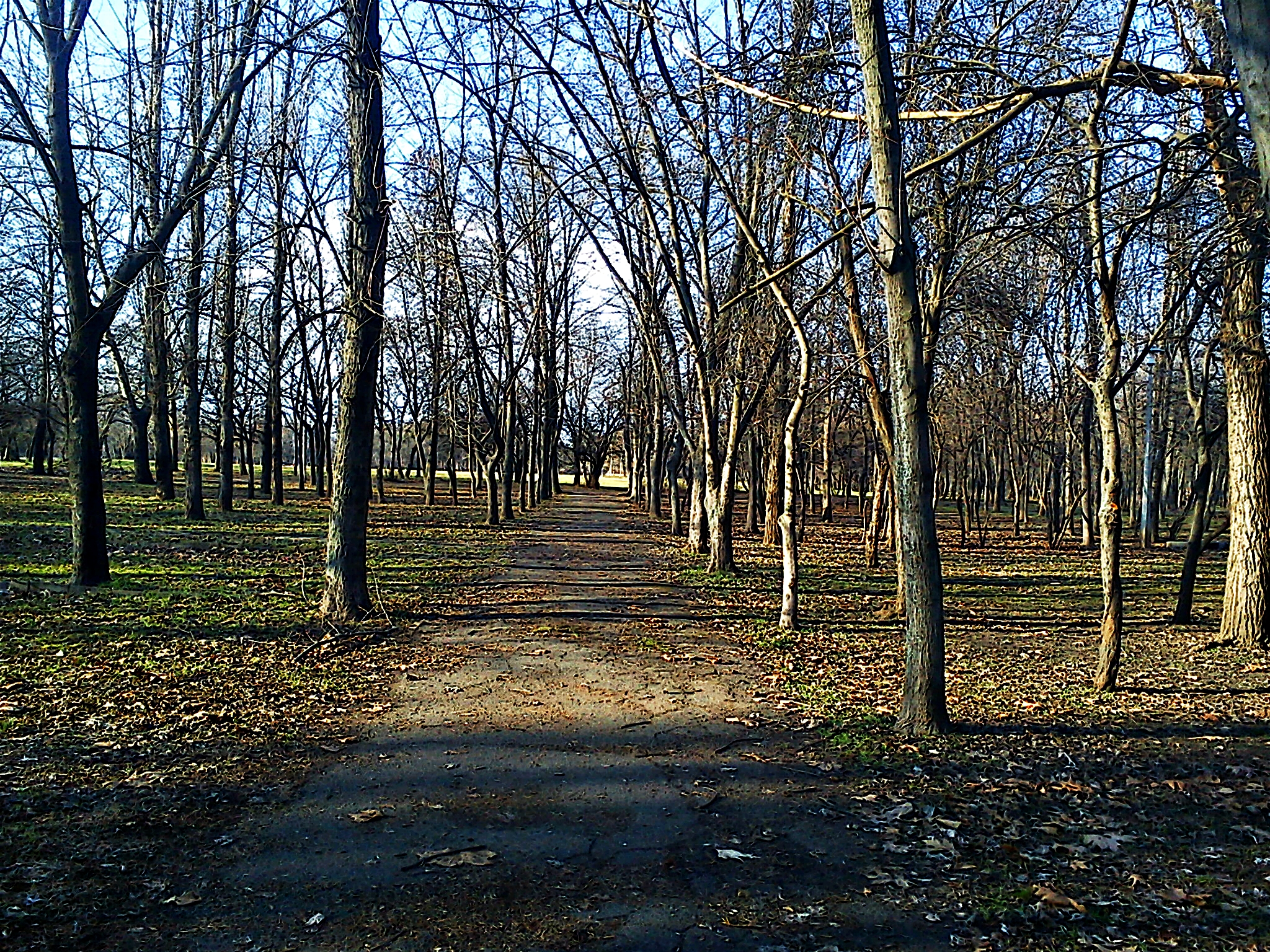 A kőbányai Óhegy park télen (Budapest, X.)